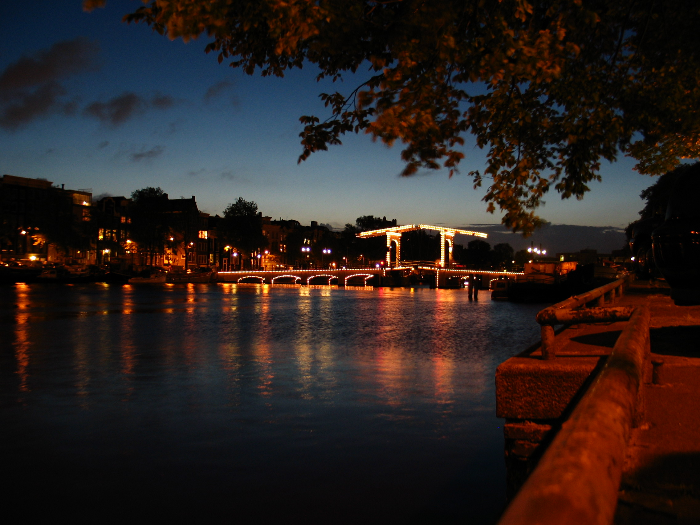 Magere brug in Amsterdam bij avond / Magere bridge in Amsterdam in the evening